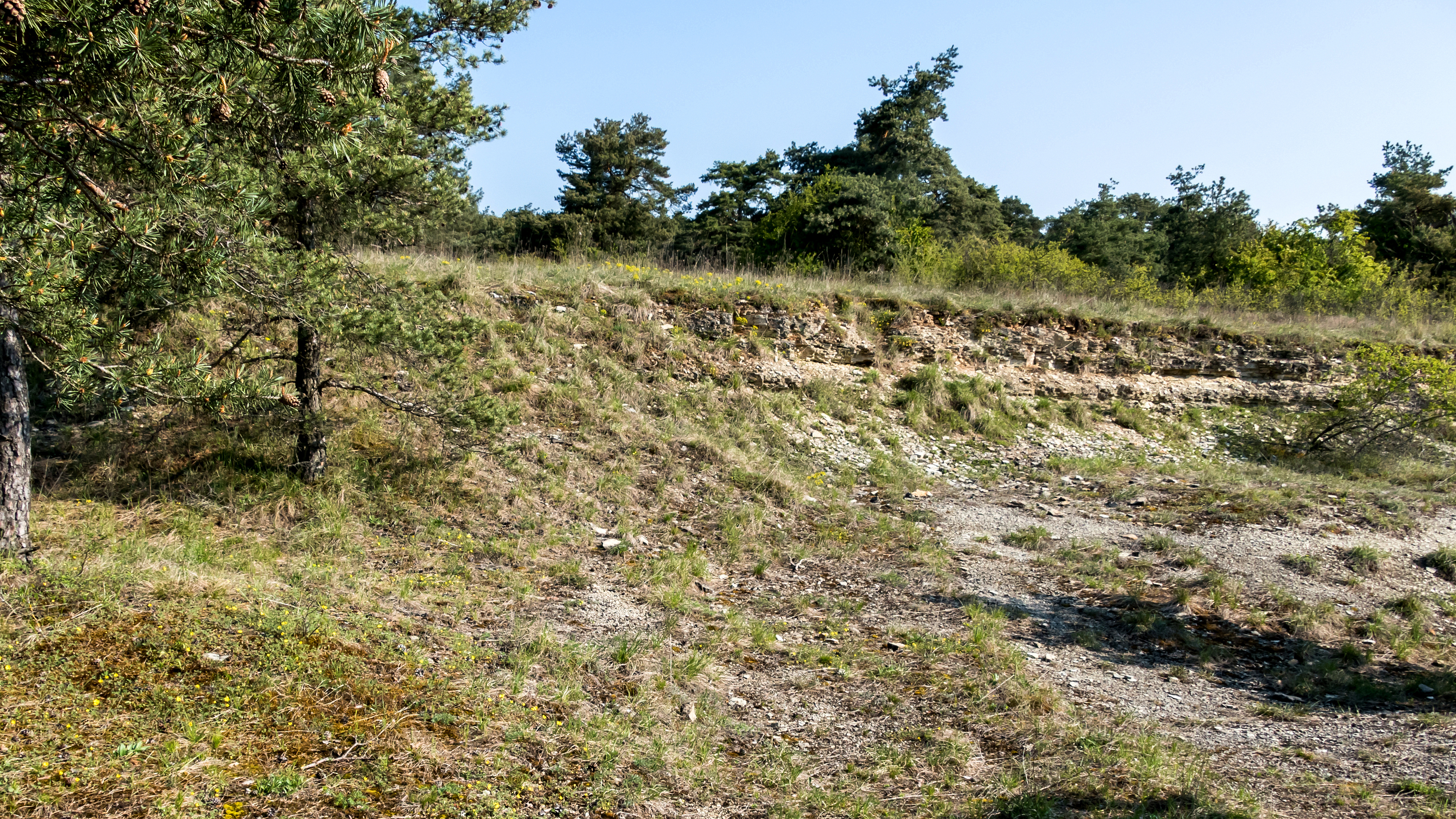 Geotope im Landkreis Würzburg Muschelkalkprofil an der Höhfeldplatte SE von Thüngersheim Geotop-Nummer 679A011 Aufschluß Südhang 3